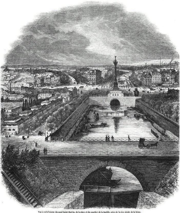 "Vue à vol d'oiseau du canal Saint-Martin, de la place et du quartier de la Bastille, prise de la rive droite de la Seine". Vue réalisée en 1845. L'éléphant de la Bastille est encore visible au sud de la place et, sur l'image, à droite de la colonne de Juillet.